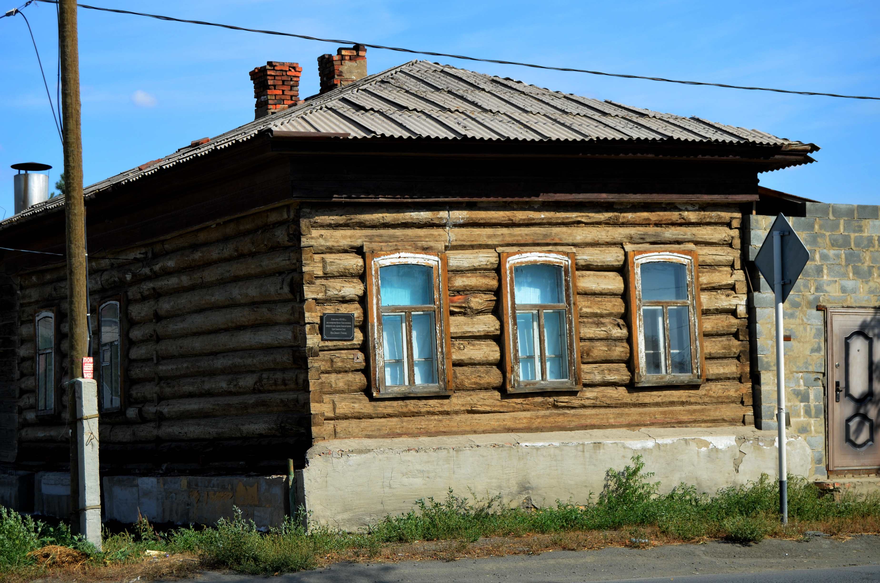 Дом, где жил герой Советского Союза Муса Джалиль: улица Карла Маркса, 19, Орск, Оренбургская область